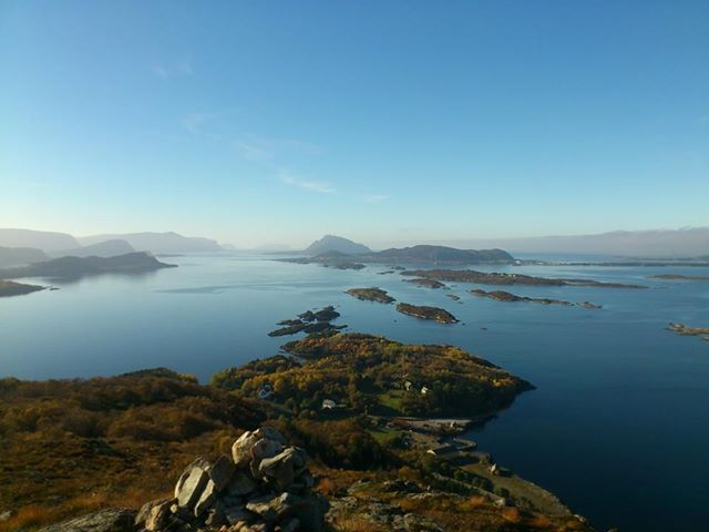 Hamnsundet i Haram